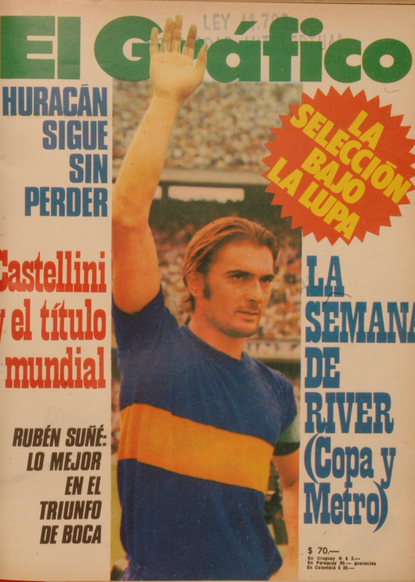 El Grafico del 03 de Marzo de 1976. Edicion 2943